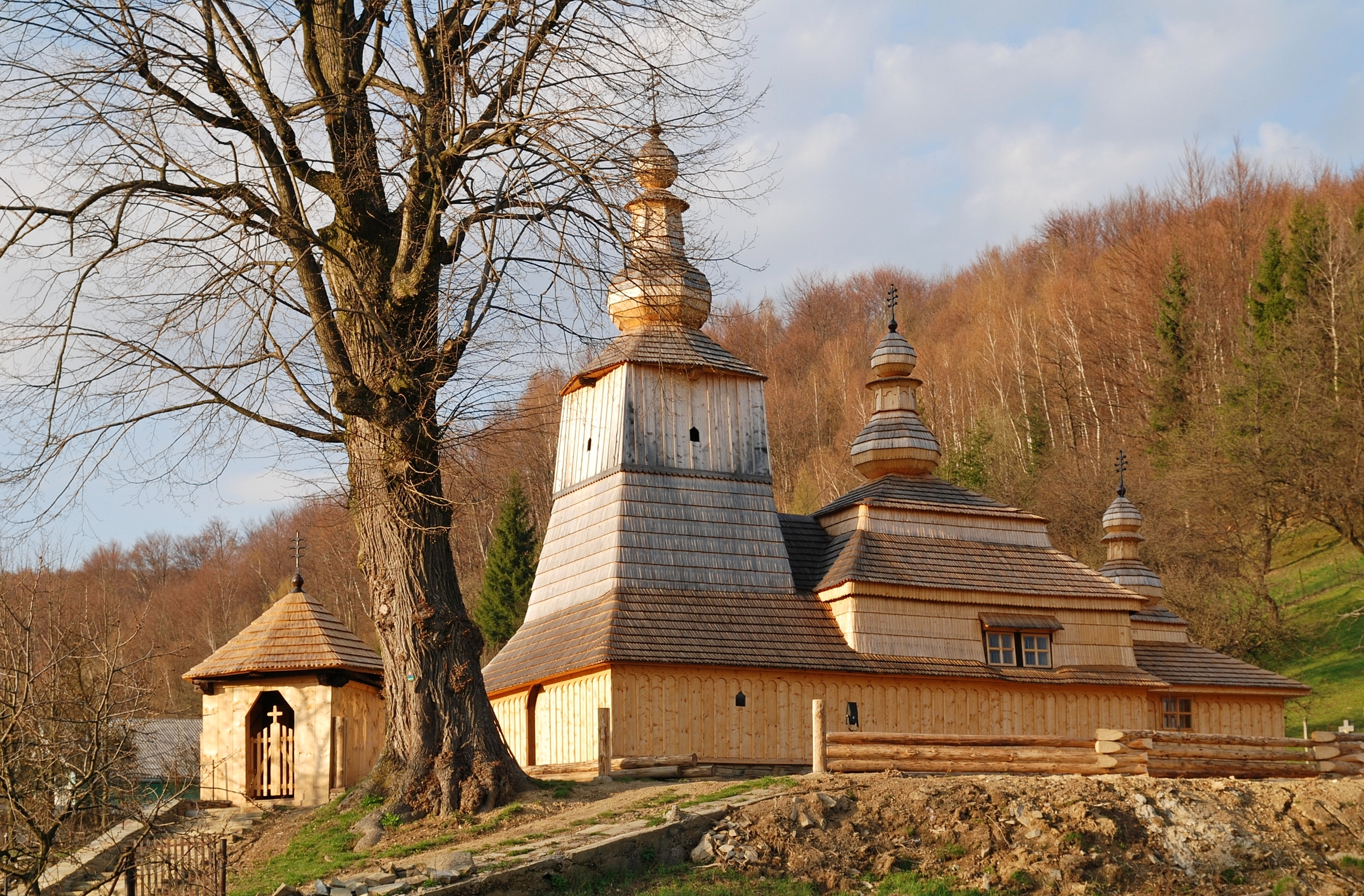 wieś Miroľa